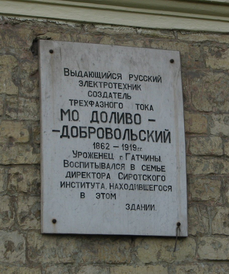 Мемориальная доска на здании Сиротского института в Гатчине